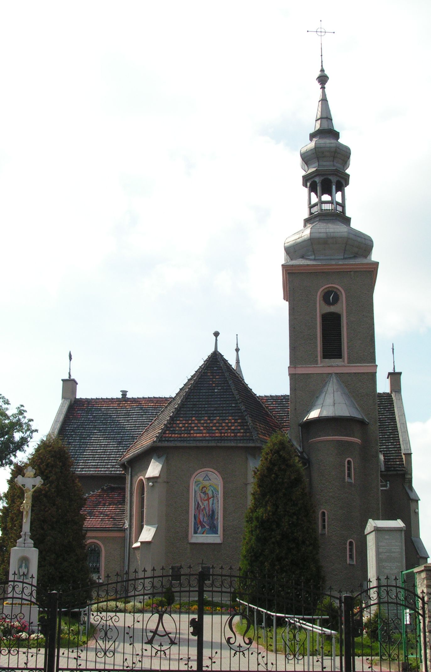 Kościół parafialny pod wezwaniem św. Michała Archanioła w Kotulinie